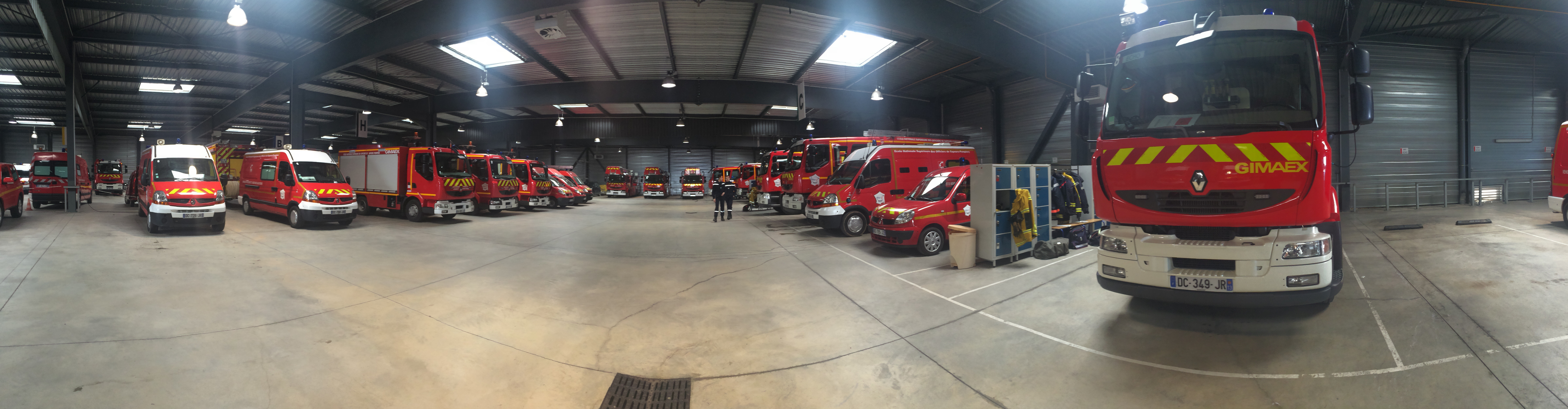 vue panoramique de l'intérieur de la remise du plateau technique de l'ENSOSP, à Vitrolles.